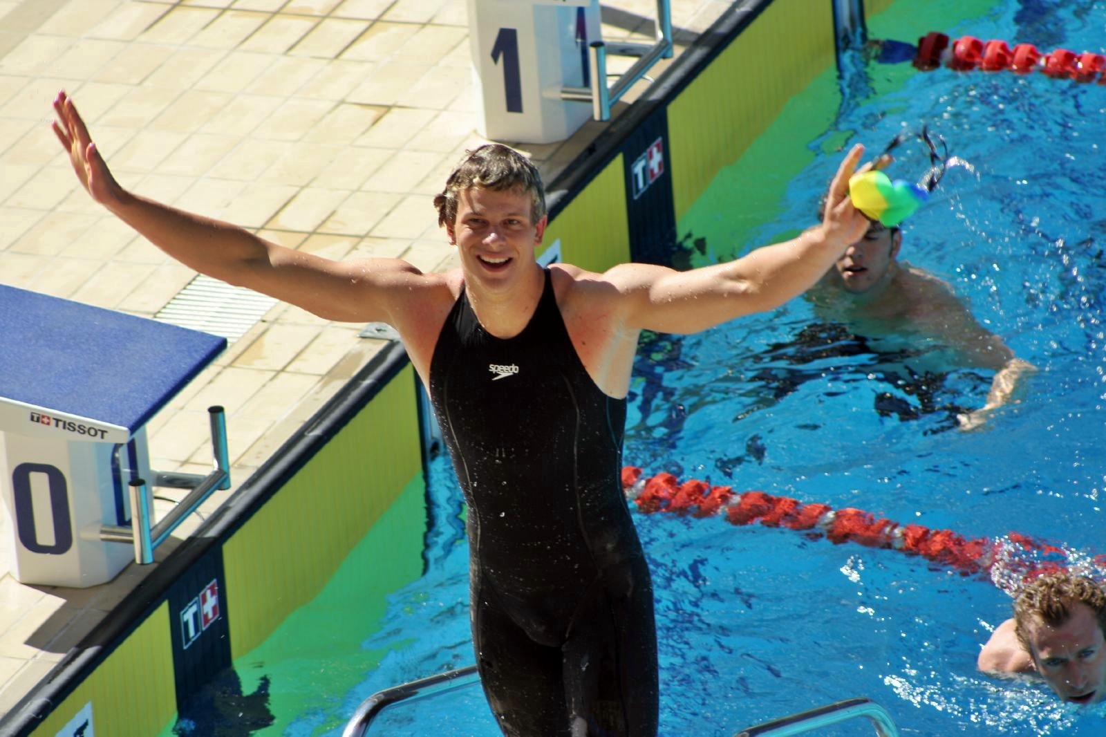 César Cielo após sua vitória na modalidade 100m Costas Masculino, em 2007.